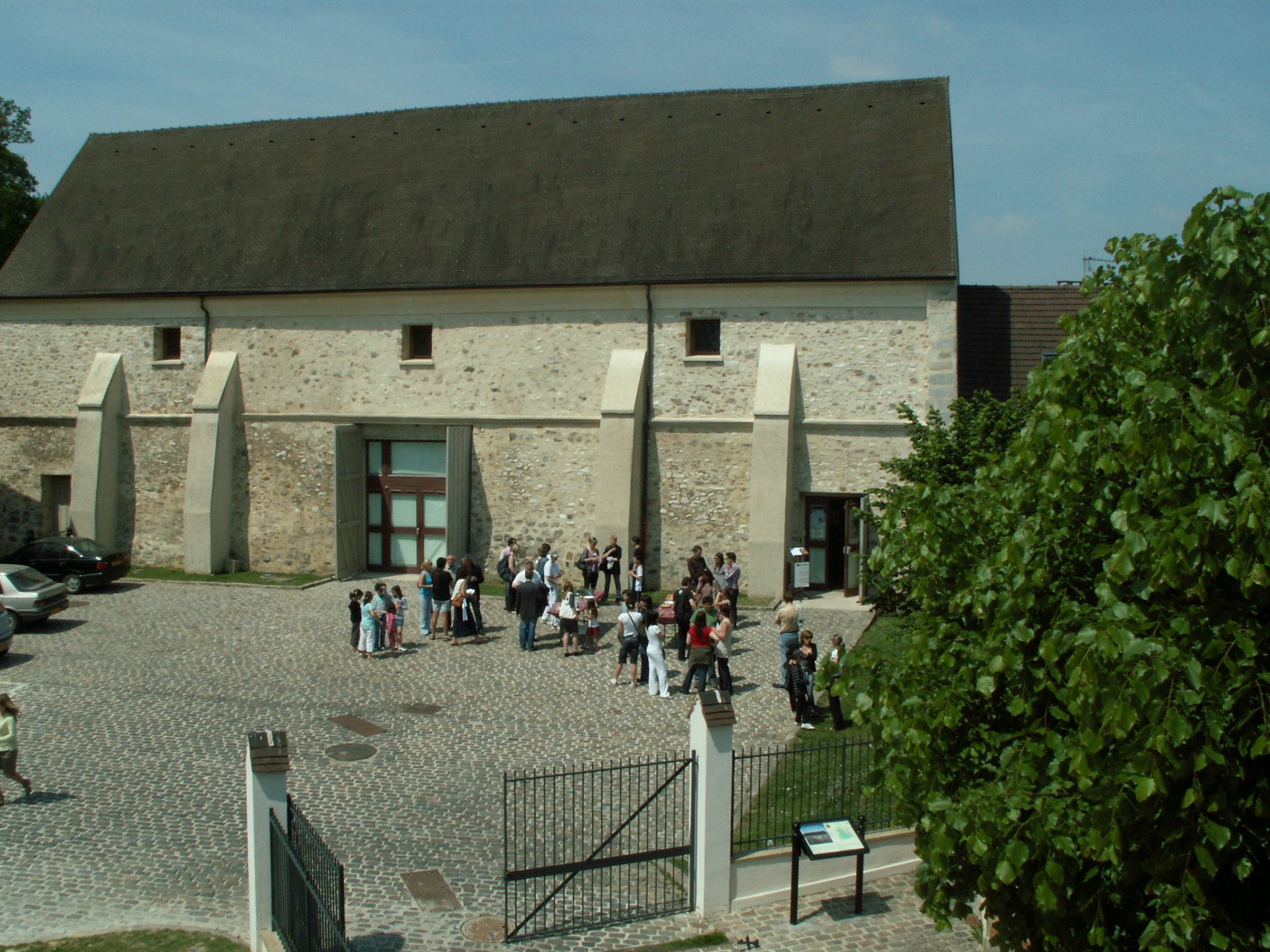 La Grange à Dîmes, Cour de l'Hôtel de Ville, 95440 ECOUEN Le bâtiment rénové abrite une salle de spectacle.